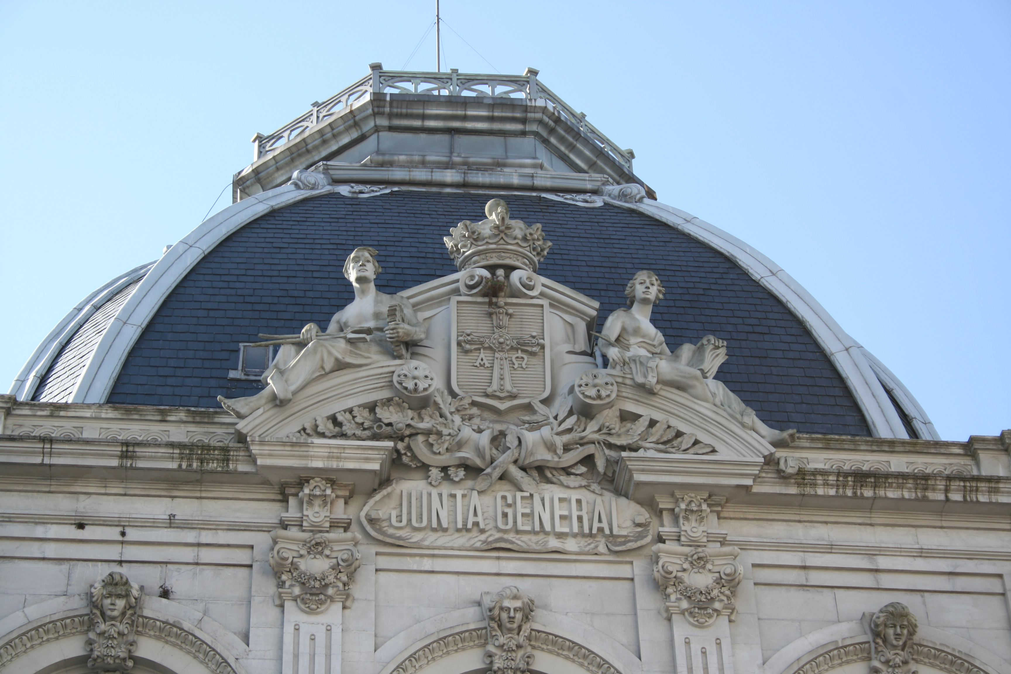 Detalle del Escudo junta general